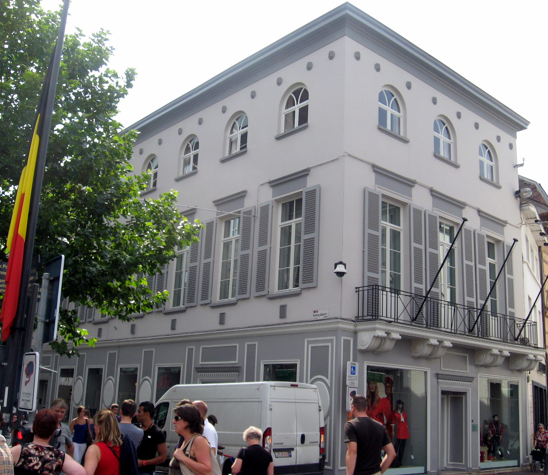 Vergaderhuis Literair Genootschap en voormalige lakenhalle in Hasselt